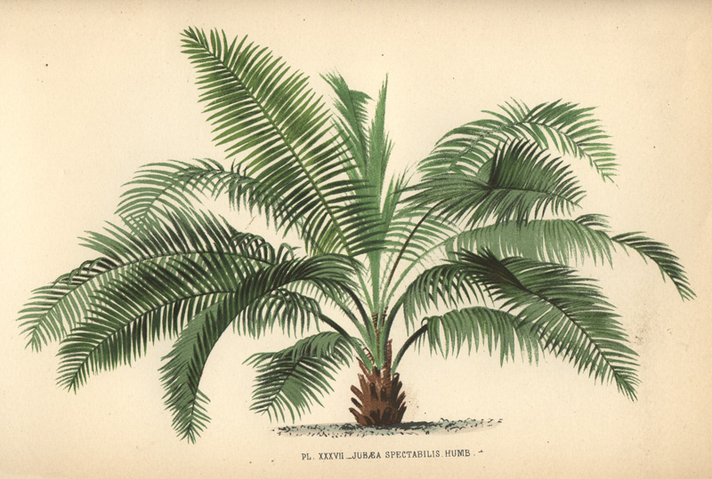 Gravure d'un jeune cocotier du Chili